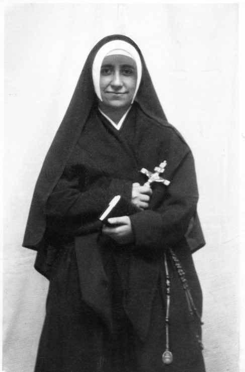 Josefa aux Feuillants à Poitiers, le 16 juillet 1922, jour de ses premiers vœux